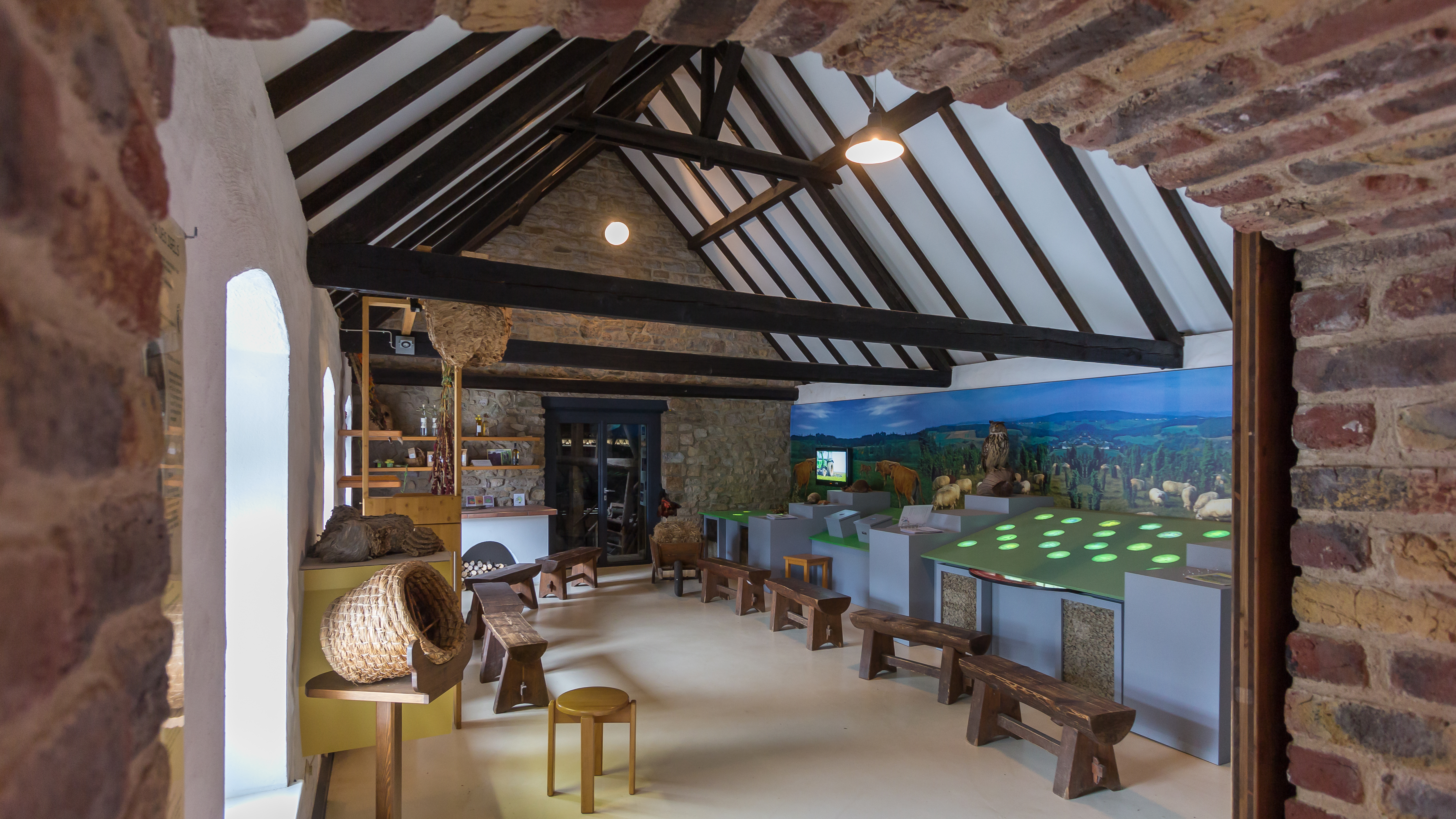 Naturzentrum Eifel